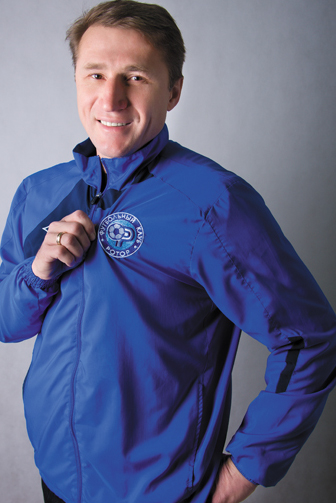 Олег Веретенников. Советский и российский футболист, старший тренер ФК «Ротор». Лучший бомбардир Высшего дивизиона чемпионата России за все сезоны, лучший бомбардир Кубка России. Фотография из серии «Лица эстафеты».